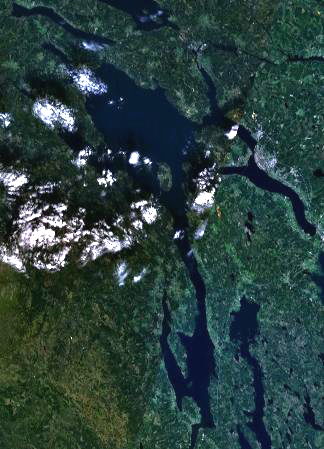 Lake Storsjön